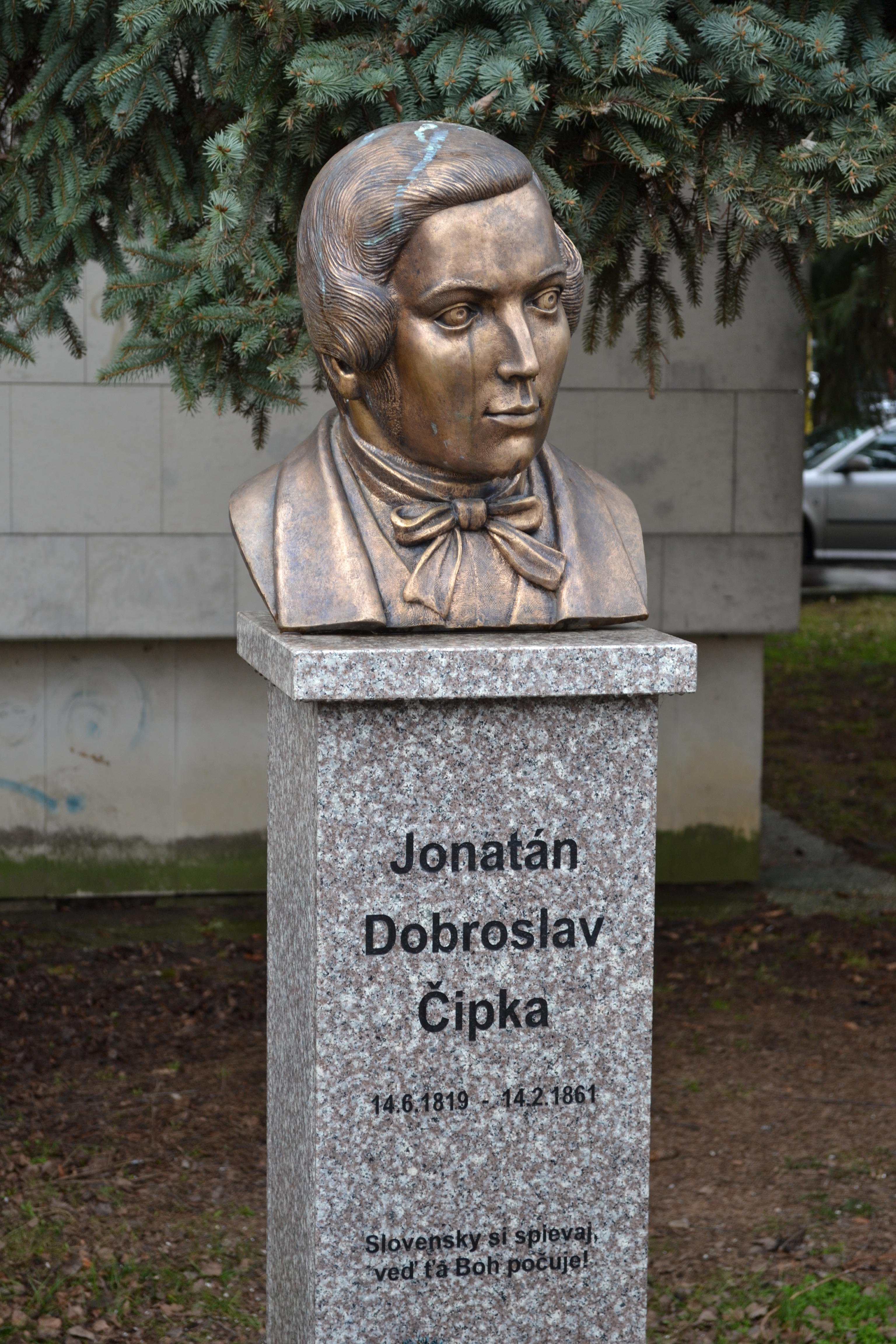 Aleja dejateľov, busta Jonatána Dobroslava Čipku